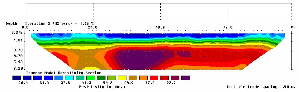 exemple de résultat obtenu avec le logiciel ELECTRE pour un panneau électrique